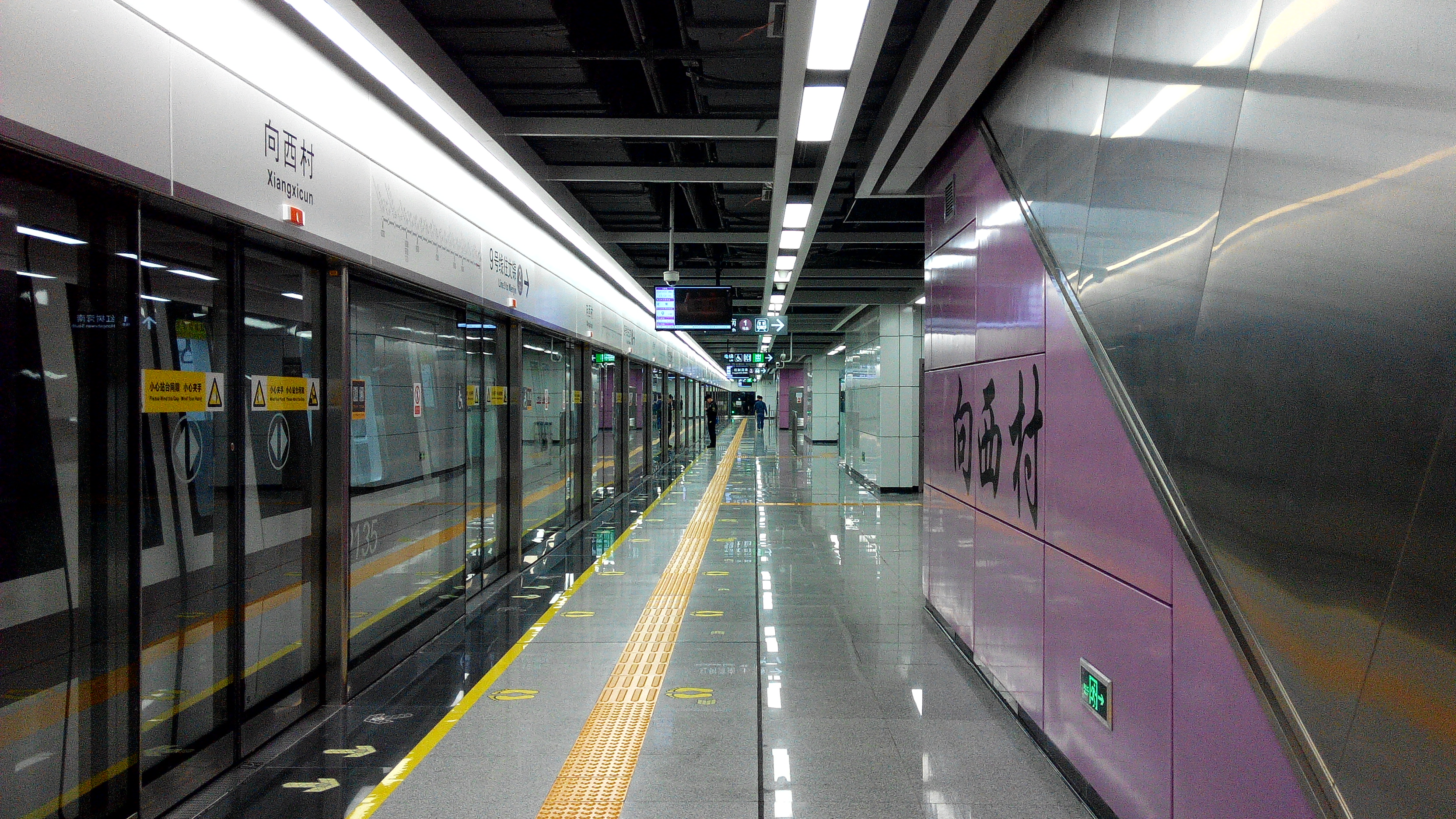 深圳地铁9号线 向西村站2号站台